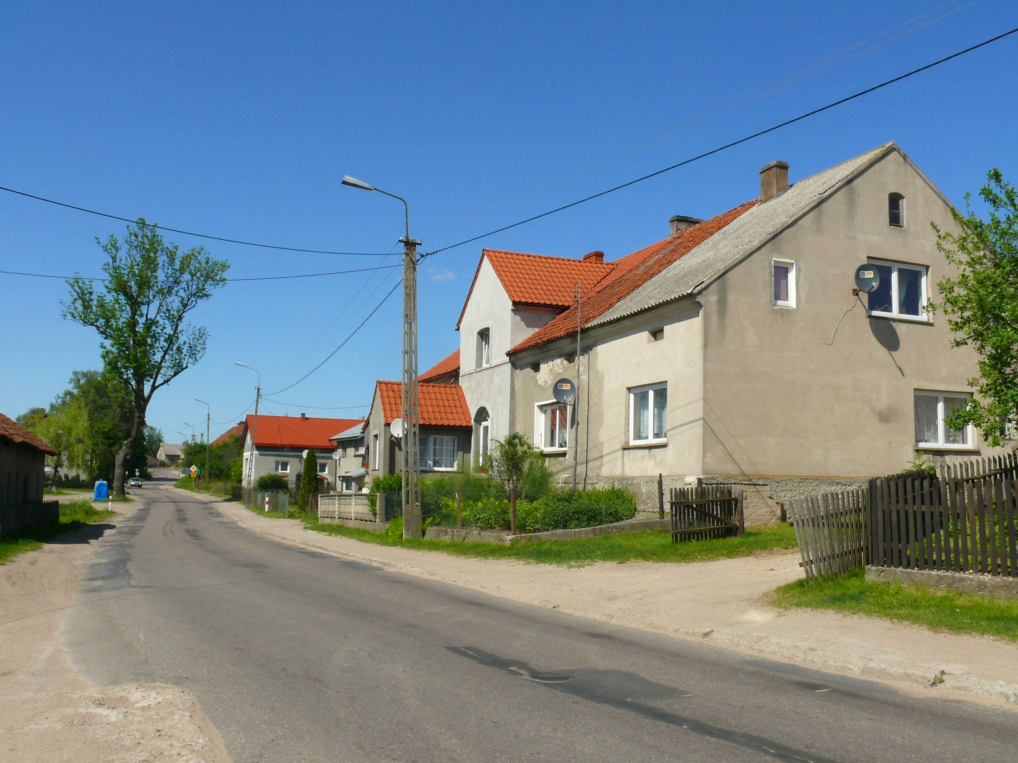 Mazury - Stare Kiełbonki